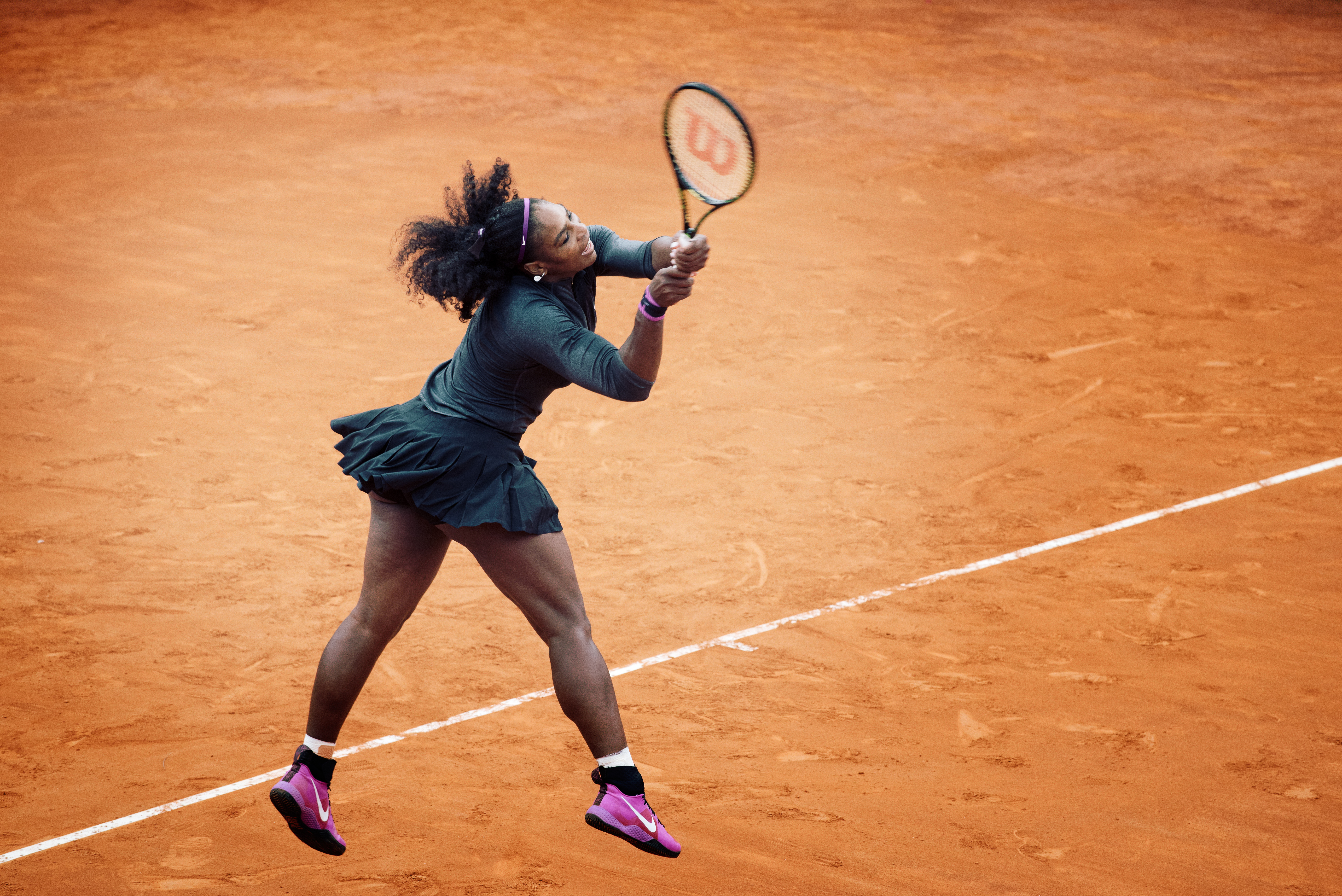 Internazionali BNL d'Italia 2016. Roma. #ibi16